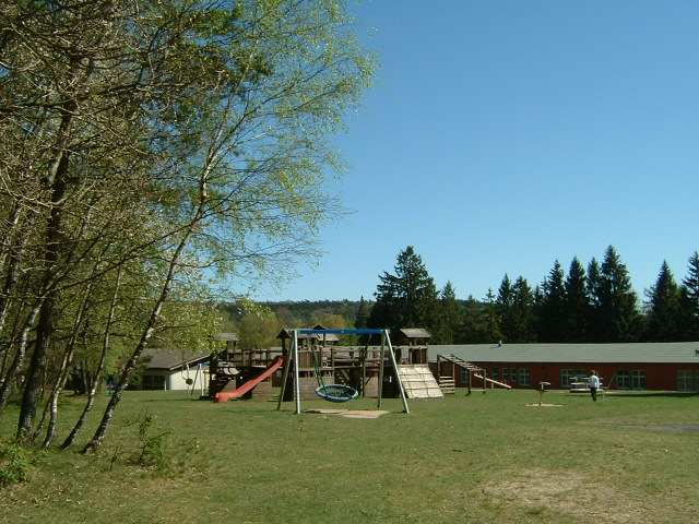 Das Kinderdorf Wegscheide ist das Schullandheim der Stadt Frankfurt am Main , im Bereich der Stadt Bad Orb. Dort wird auch Unterricht abgehalten. Hier der Spielplatz Auf der Höh.